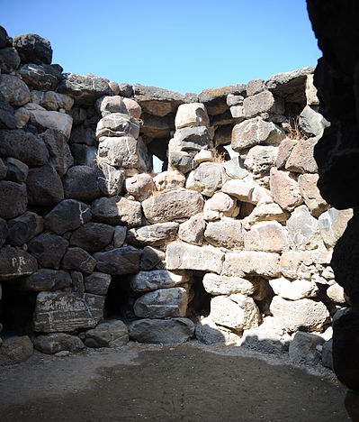 Nurag Su Nuraxi (Barumini, Sardenya): suposades espitlleres